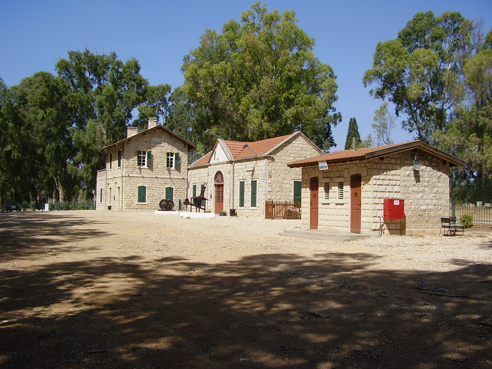 תחנת הרכבת בכפר יהושע